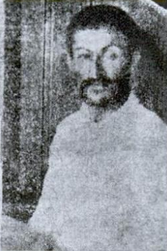 José Camillo, chefe do Povo da Serra, preso pela Companhia de Fuzileiros em Pau de Colher, Bahia, 1938